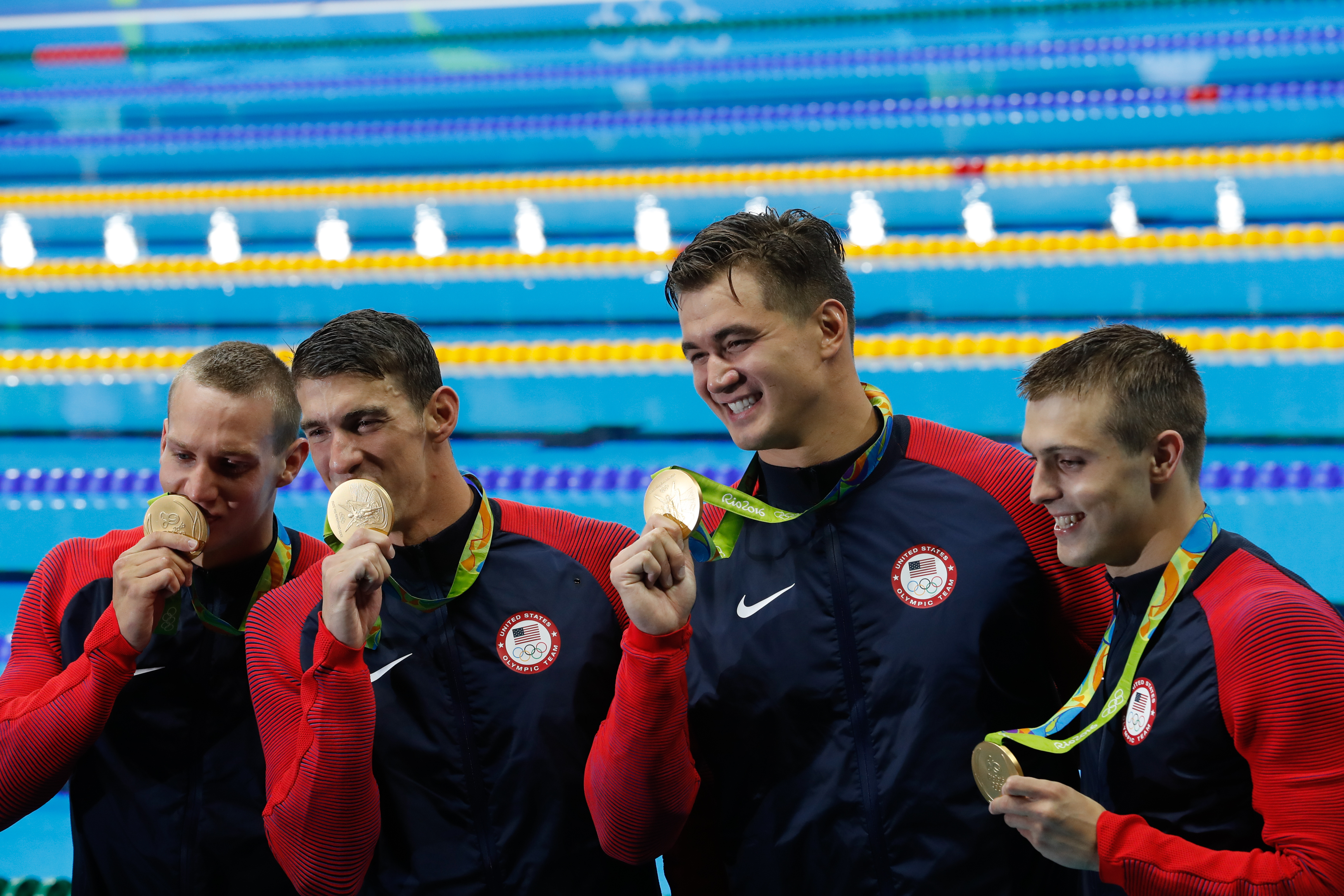 Rio de Janeiro - Nadadora norte-americana Katie Ledecky bate recorde mundial e leva medalha de ouro nos 400m livre nos Jogos Olímpicos Rio 2016 (Fernando Frazão/Agência Brasil)